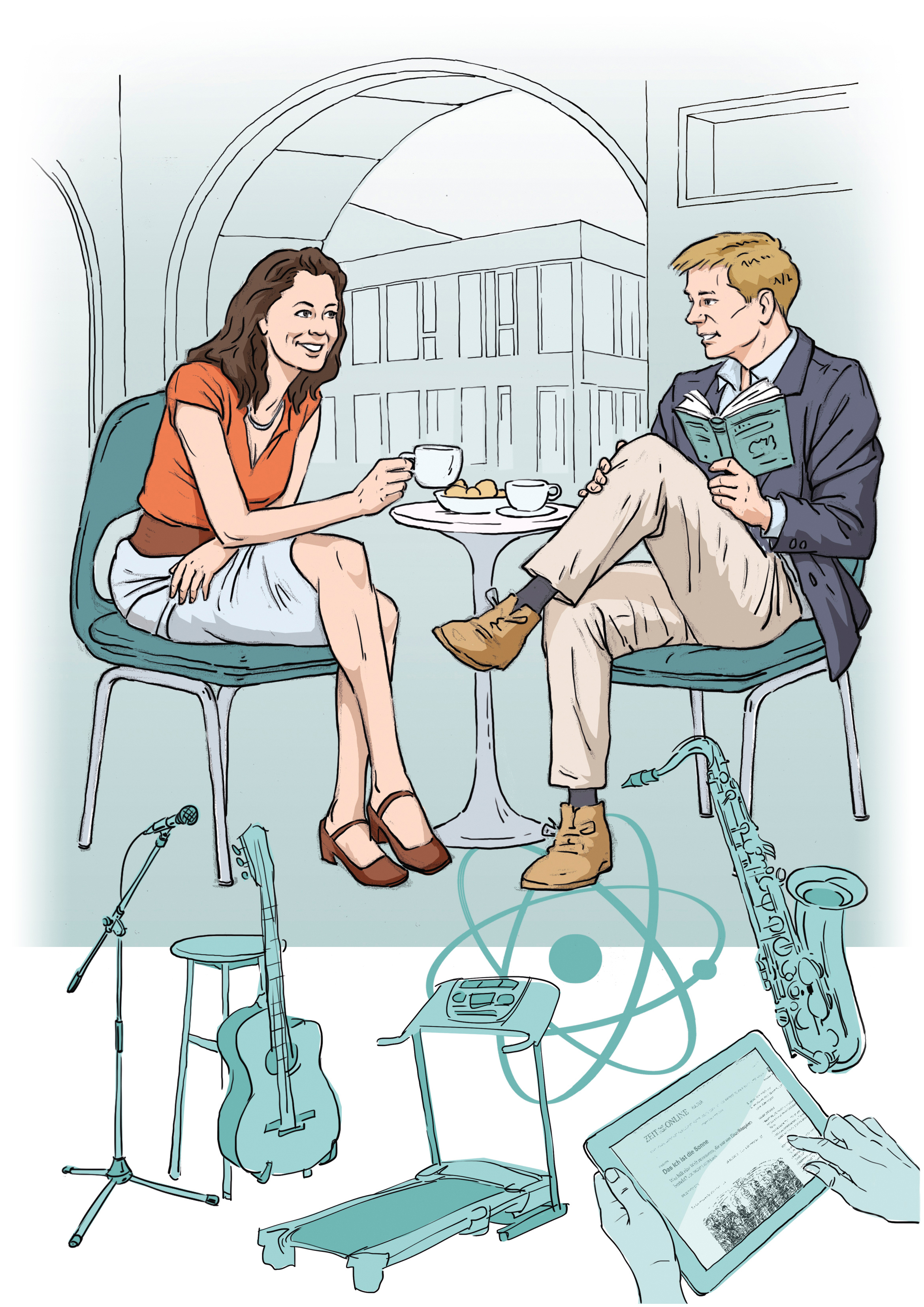 Grafische Darstellung des Typus "Moderne Etablierte" aus der ARD-/ZDF-MedienNutzerTypologie. Beispielhafte Aussage: "Leben und leben lassen."